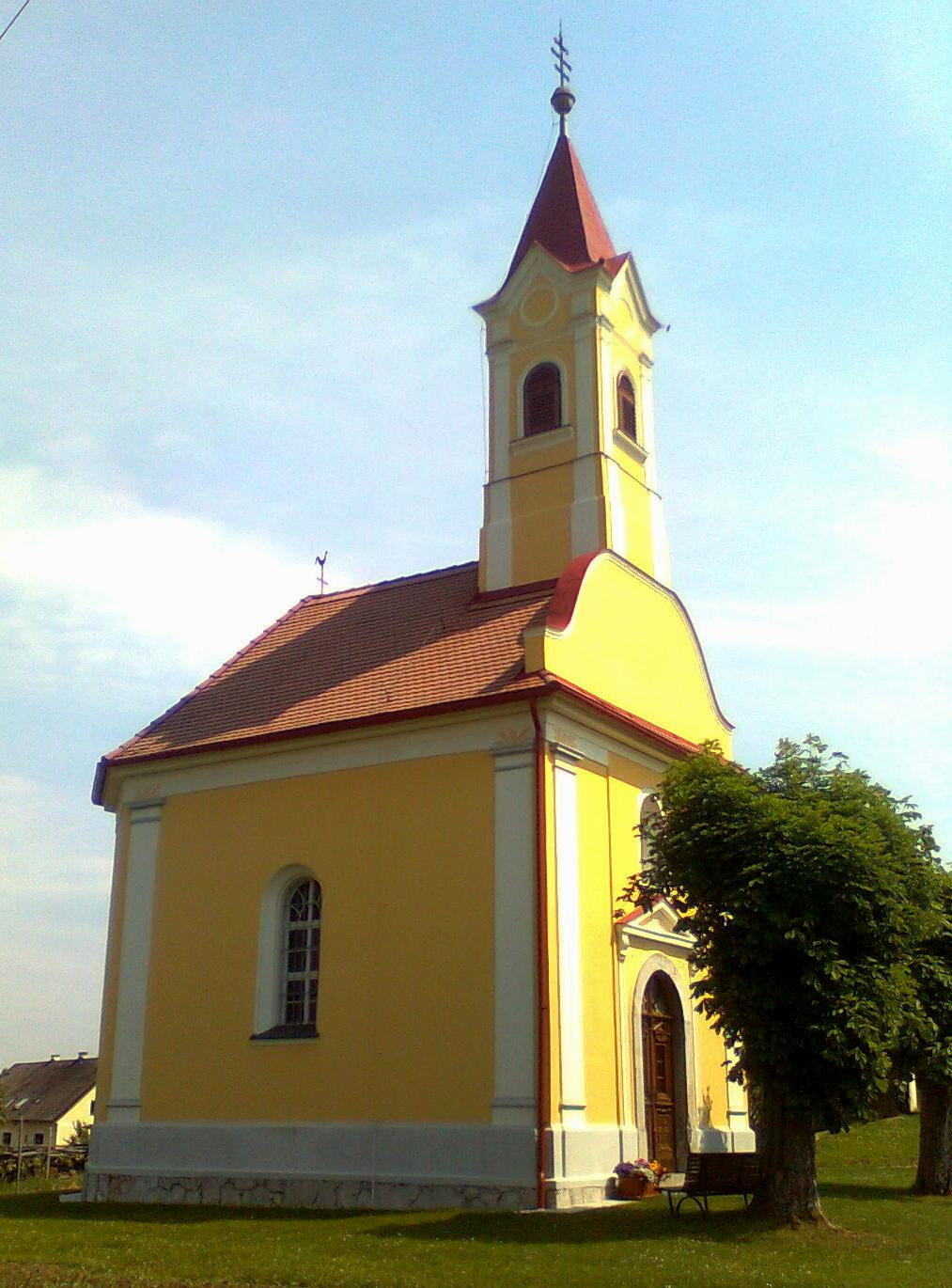 Donatuskapelle in Langegg bei Graz